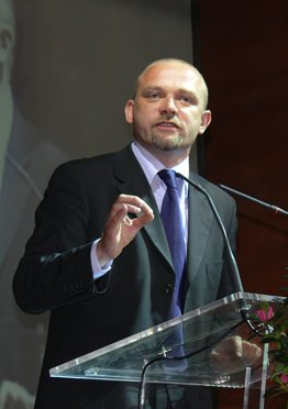 M. Frédéric Nihous - Meeting à Langon (33) le 12 avril 2007